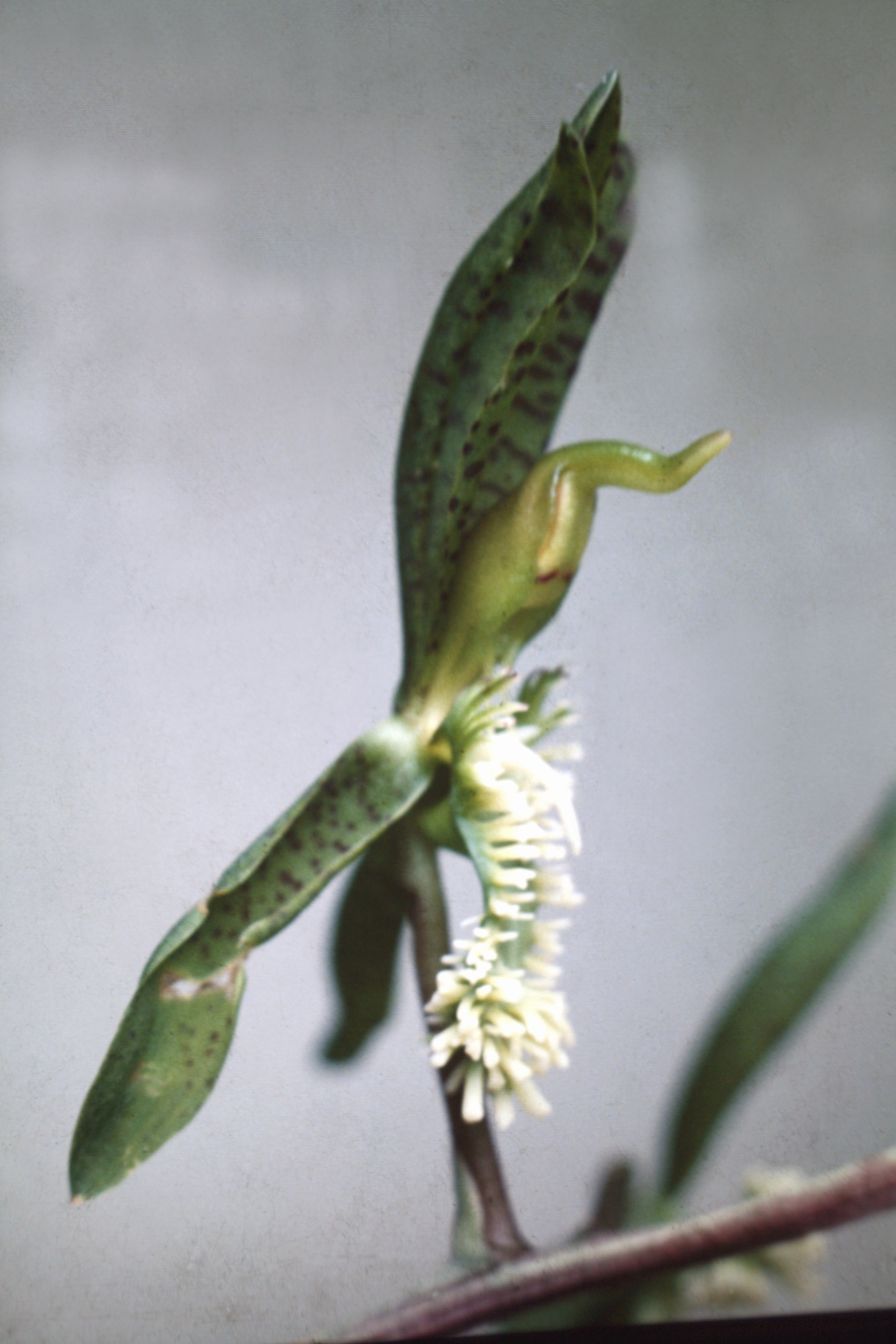 Catasetum barbatum, Suriname.